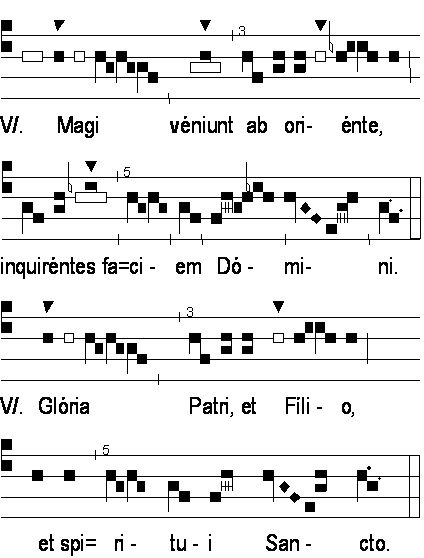 Verset de répons prolixe du premier mode